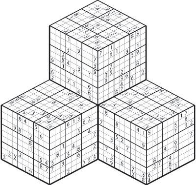 Sudoku 3D puzzle